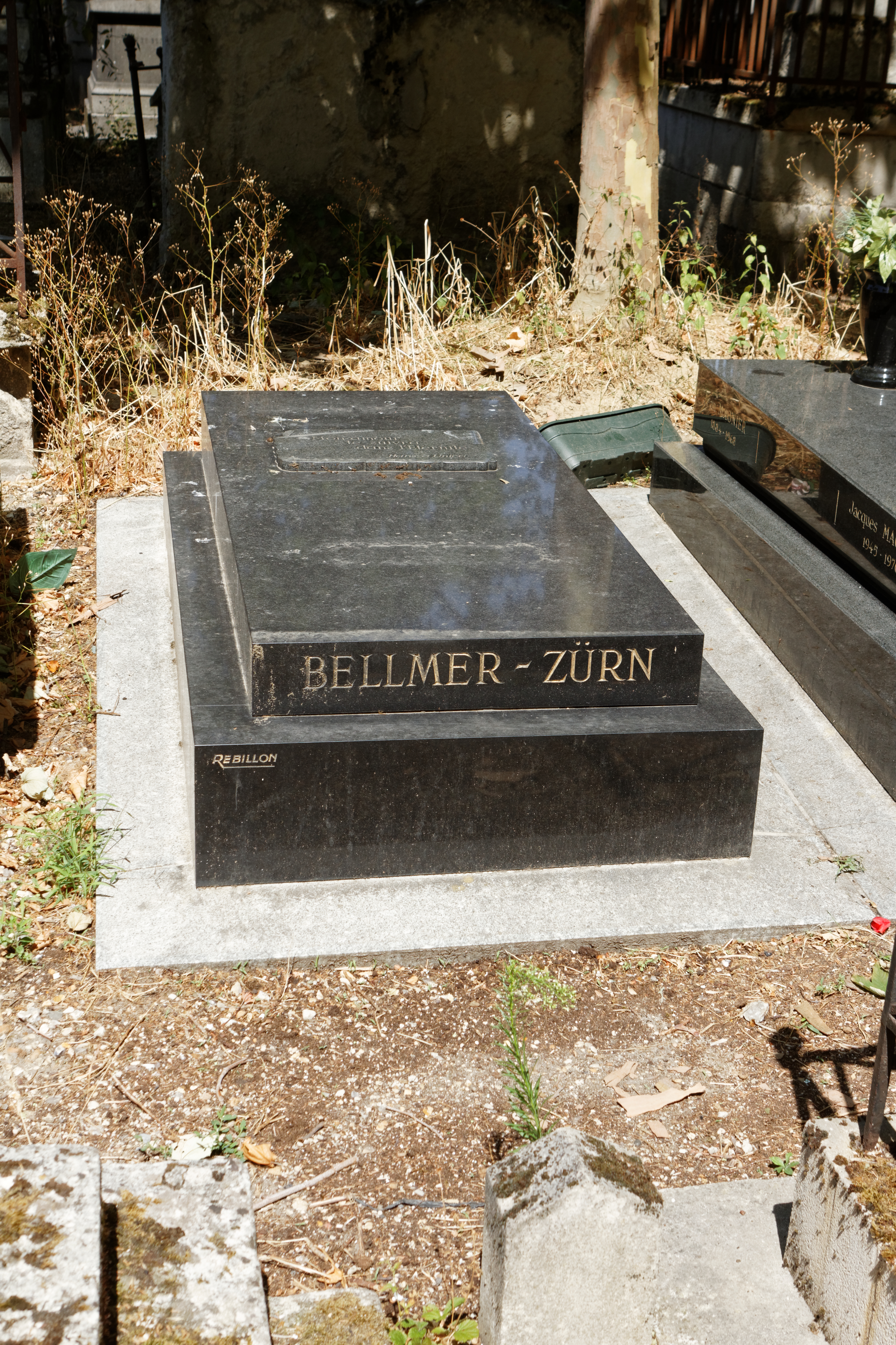 Sépulture de Hans Bellmer (1902-1975), peintre, photographe, graveur, dessinateur et sculpteur franco-allemand, l'un des artistes majeurs du surréalisme ; Unica Zürn (1916-1970), artiste et écrivain allemande.